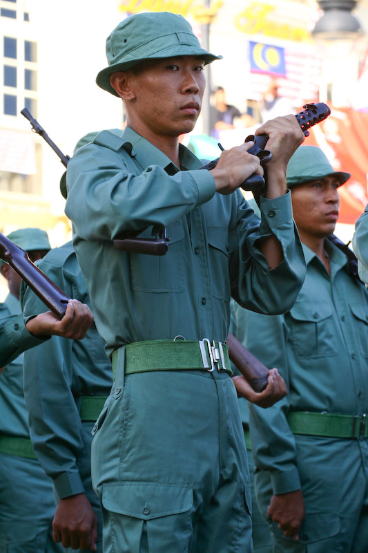 L'Escouade de Jungle de Police pendant la parade. La force avant de renomme comme la Police la Force de Champ Para-militairee à la Force d'Opération Générale est impliquée dans le combat de collection de quelque opération contre indonésien communiste terroriste et l'activité de guérilla pendant les conflits Malaisie-indonésien. : The Police Jungle Squad during the parade. The force before rename as the Police Paramilitary Field Force to General Operation Force are involved in a few operation series fight against Indonesian communist terrorist and guerrilla activity during Malaysia-Indonesian confrontations.